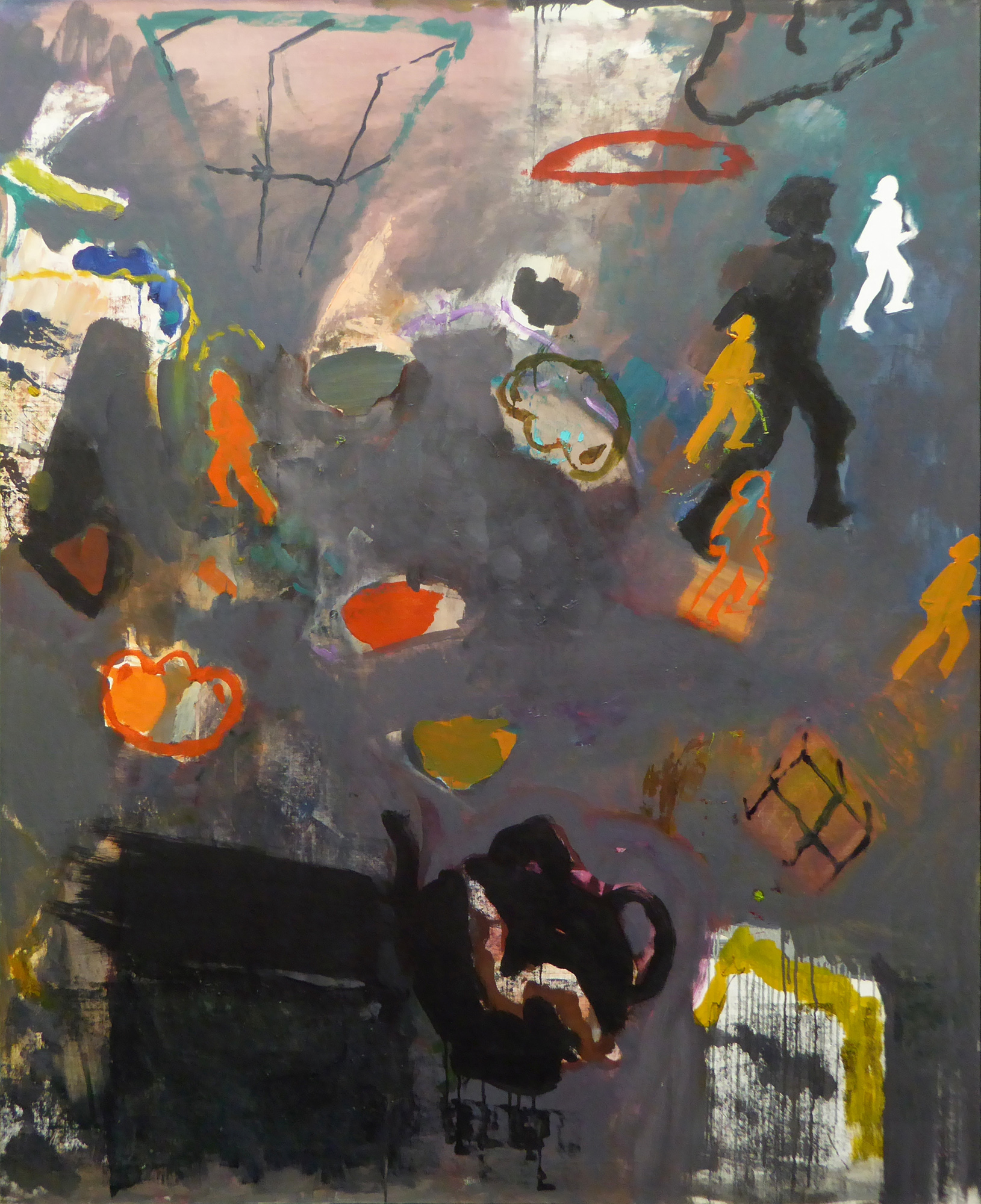 בורחת - 1992